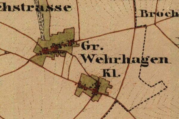 Preußische Kartenaufnahme 1846 - Uraufnahme